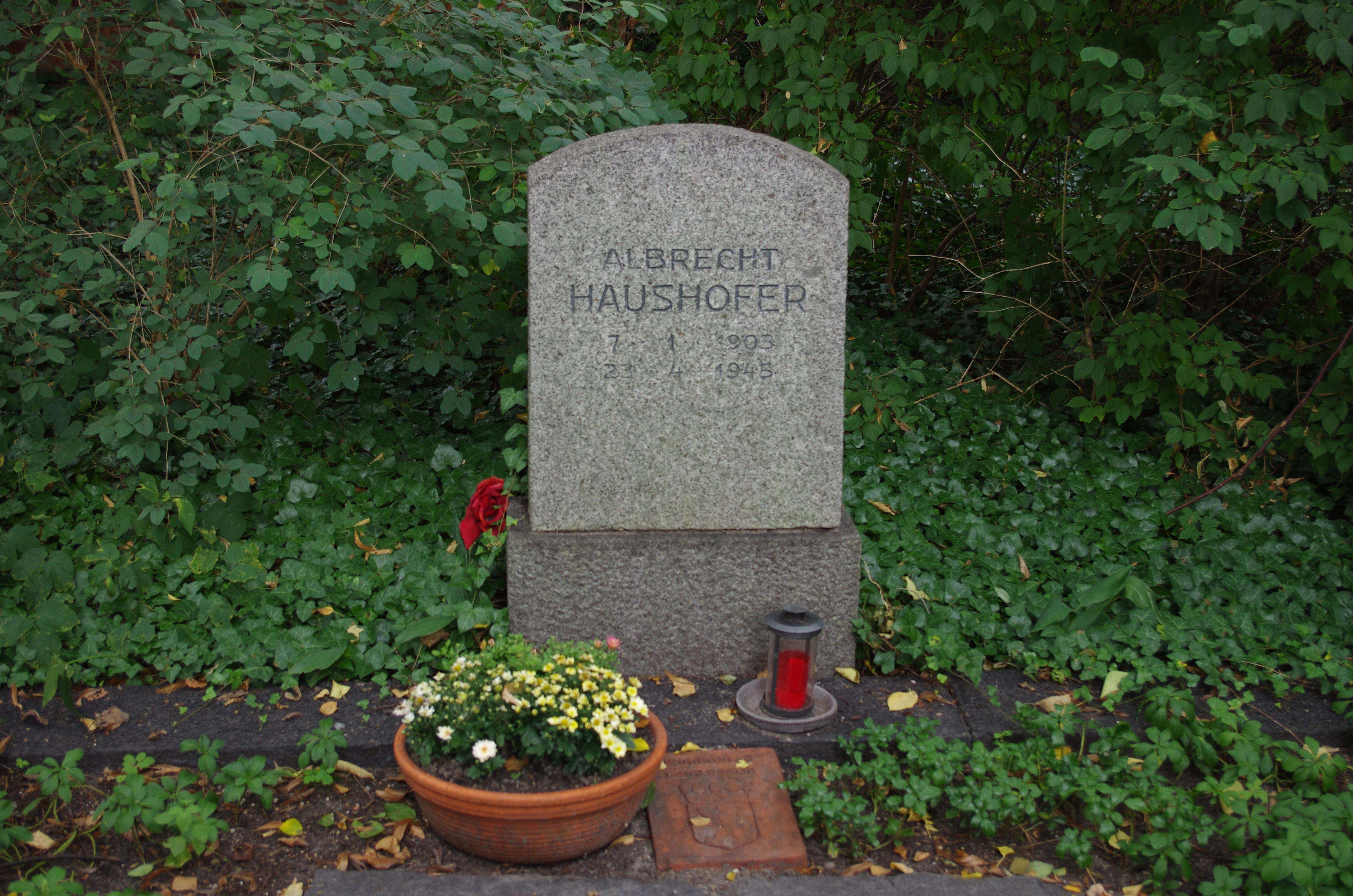 Der Kriegsgräberfriedhof befindet sicj in Berlin-Moabit in der Wilsackerstraße. Zu sehen ist das Ehrengrab Berlins für Albrecht Haushofer.